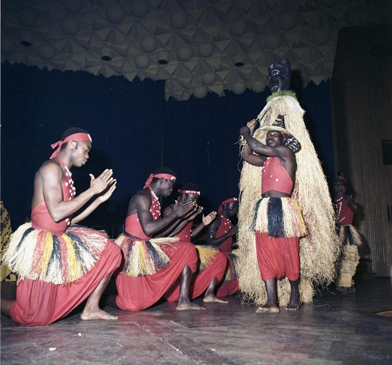 Afrika Woche 1962. National Ballett aus Guinea in der Beethovenhalle